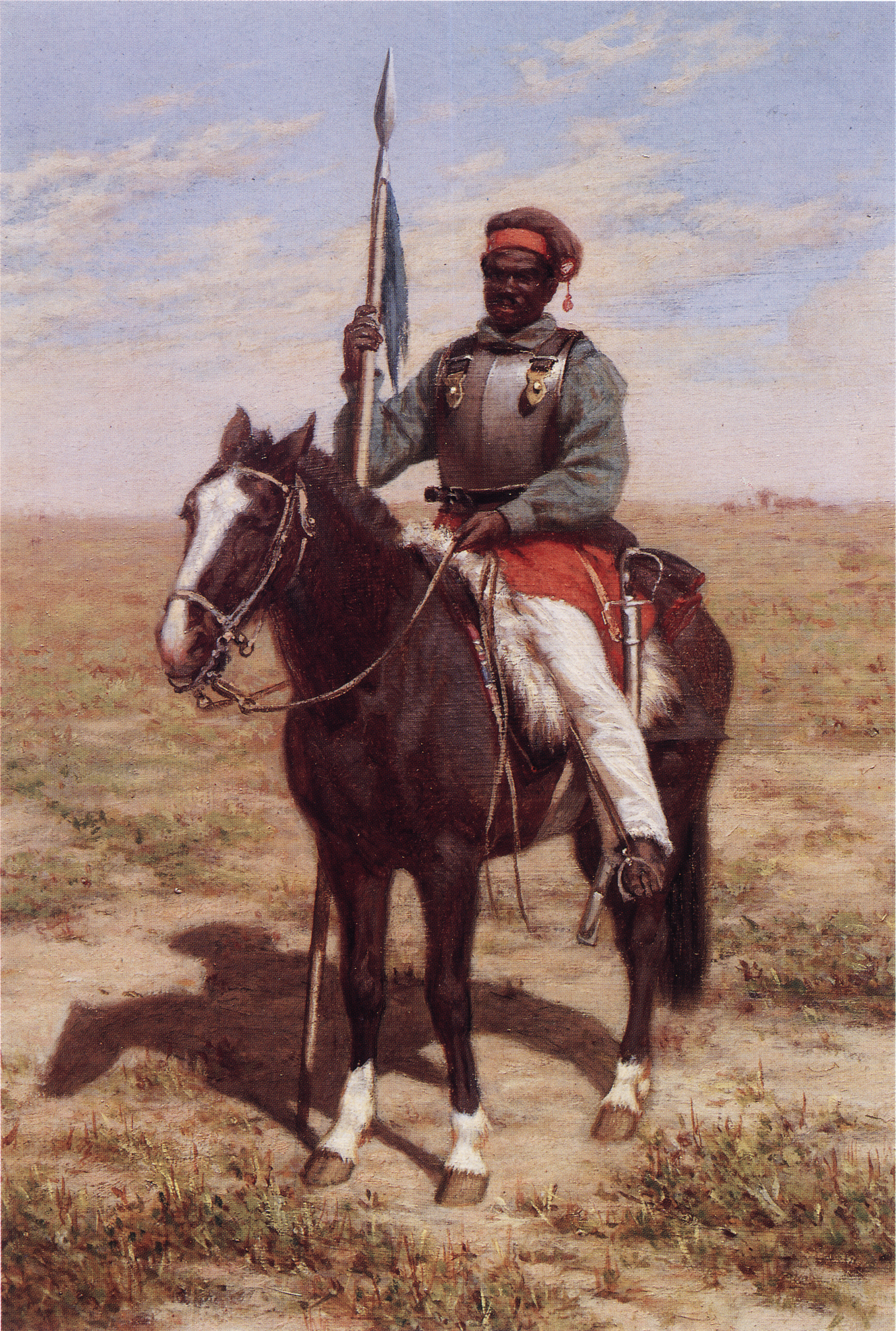 Lancero de la época de Rivera - s.f. - Oleo sobre cartón - 36 x 24,5 cm - Colección particular - Buenos Aires - Argentina